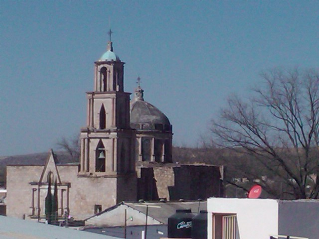 Templo de San Nicolás en Colotlán, Jalisco